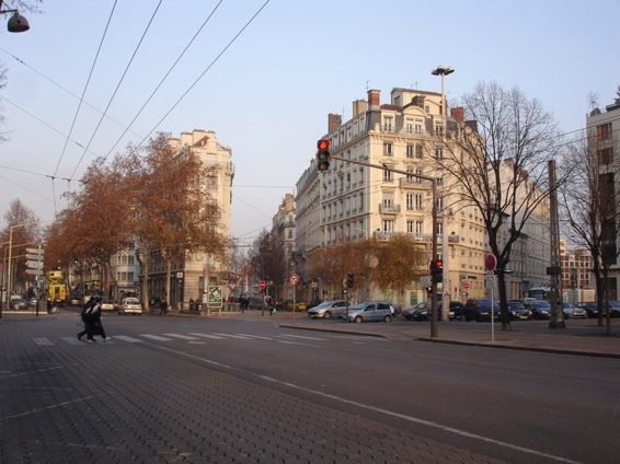 Place Jean Macé à Lyon ; Le même site de nos jours (17/12/2007).